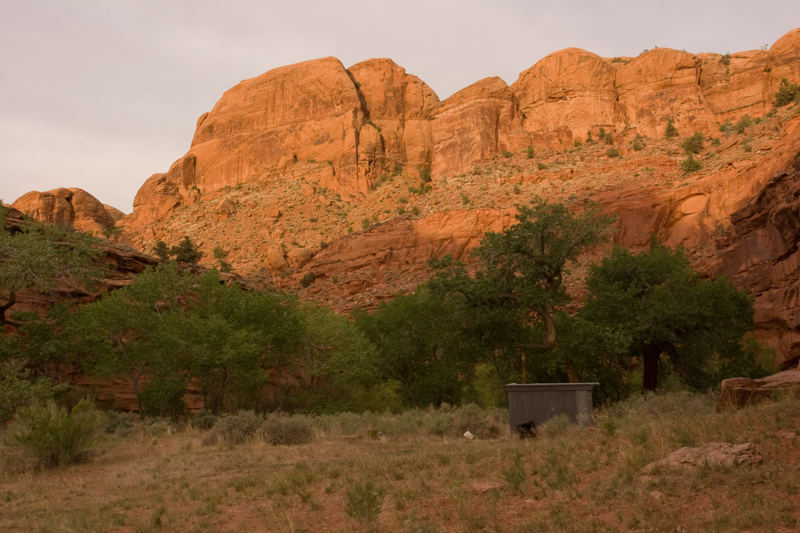 Campsite - Horse Canyon